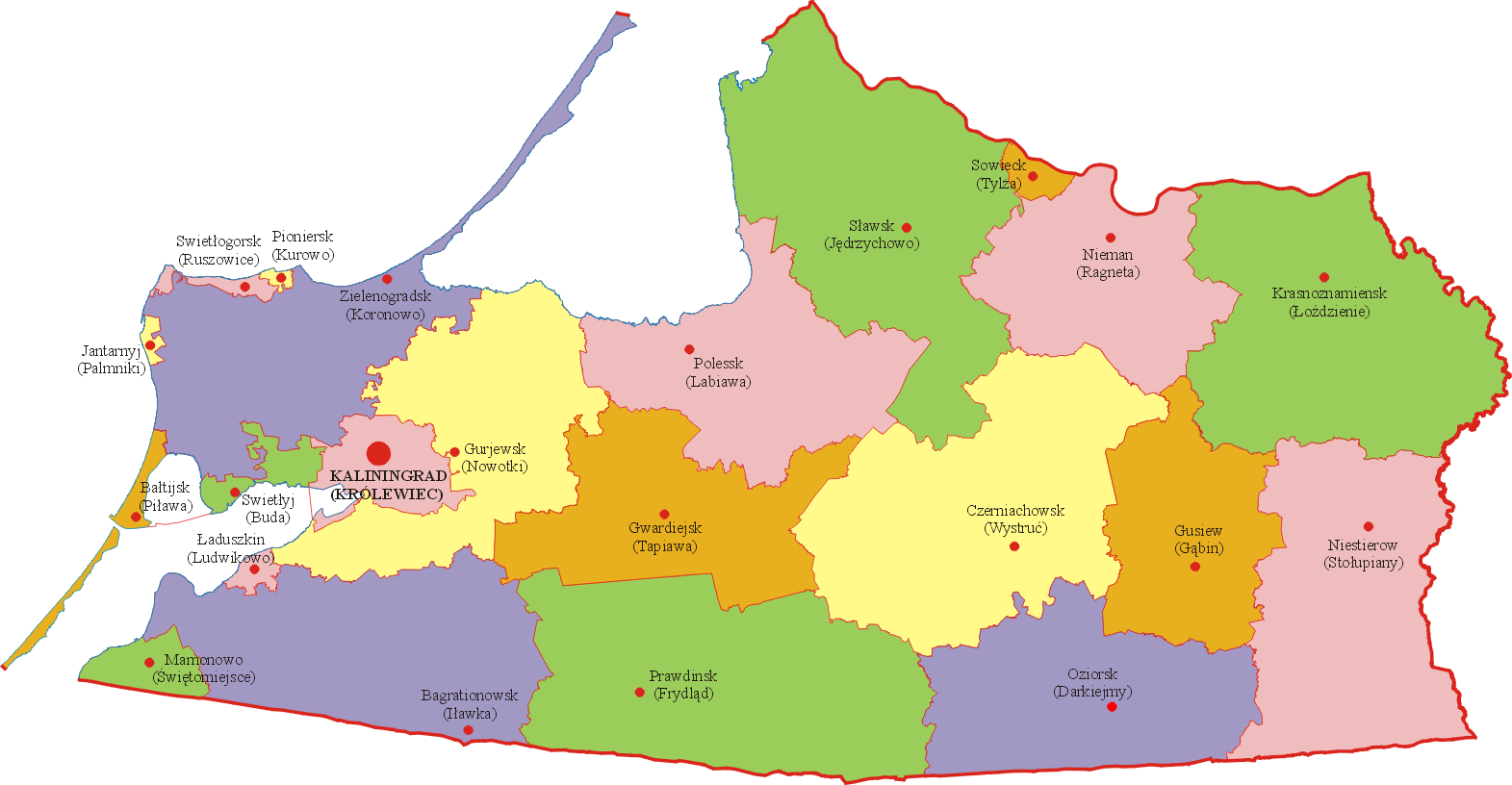 Podział administracyjny obwodu kaliningradzkiego - rejony i miasta na prawach rejonów.